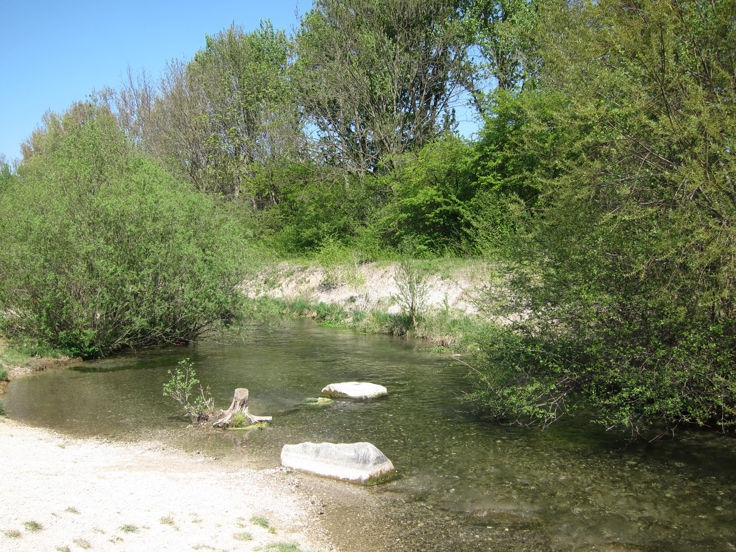 Naturnah gestalteter Seitenarm am Riemer Feld in Daglfing